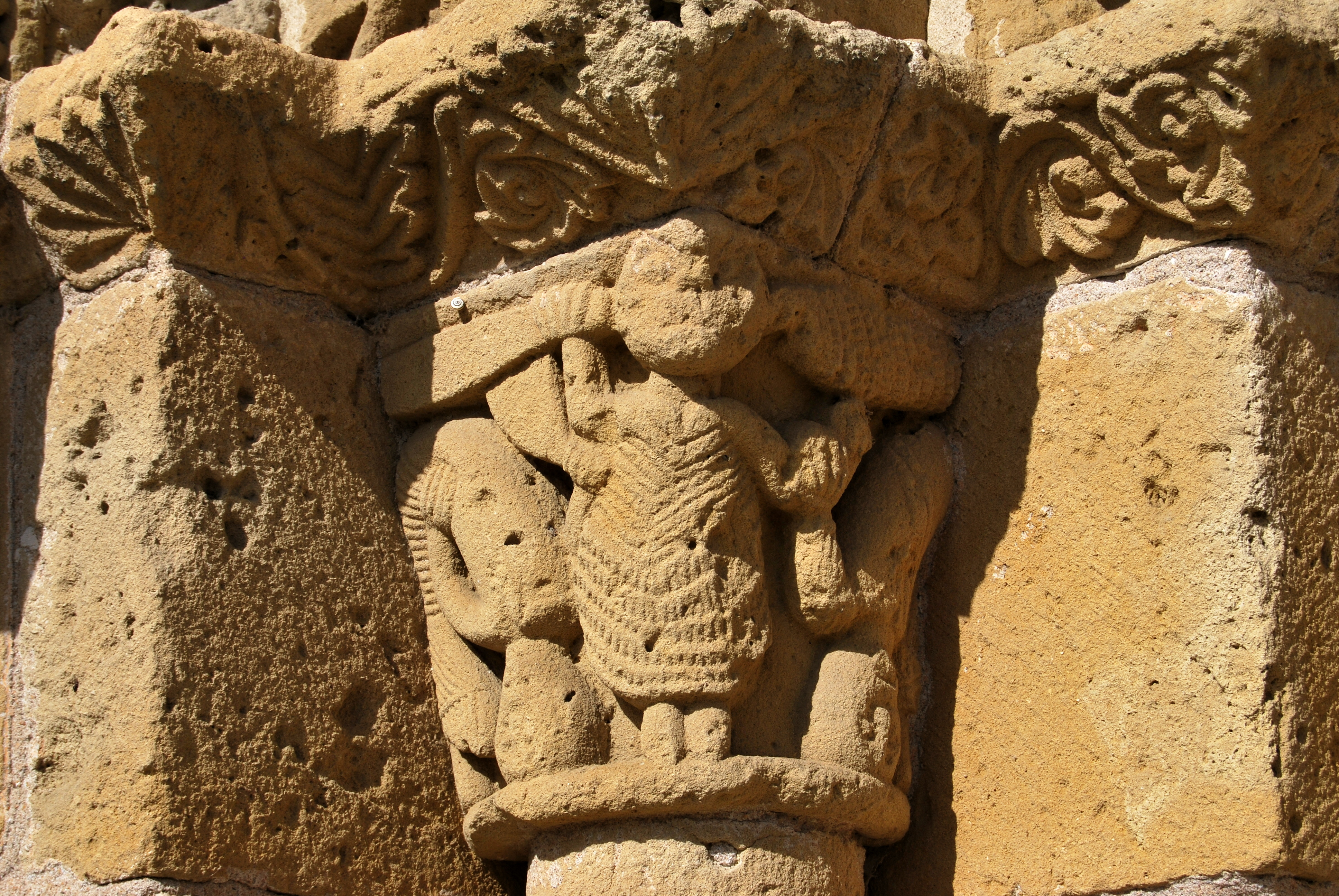 Église St Martin de Saint-Martin-de-Sescas